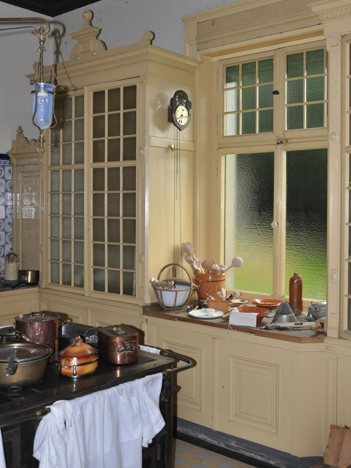 Ansicht der sich im ursprünglichen Zustand befindenden Küche des Schloss Hünegg am Thunersee in der Schweiz im Sommer 2012.